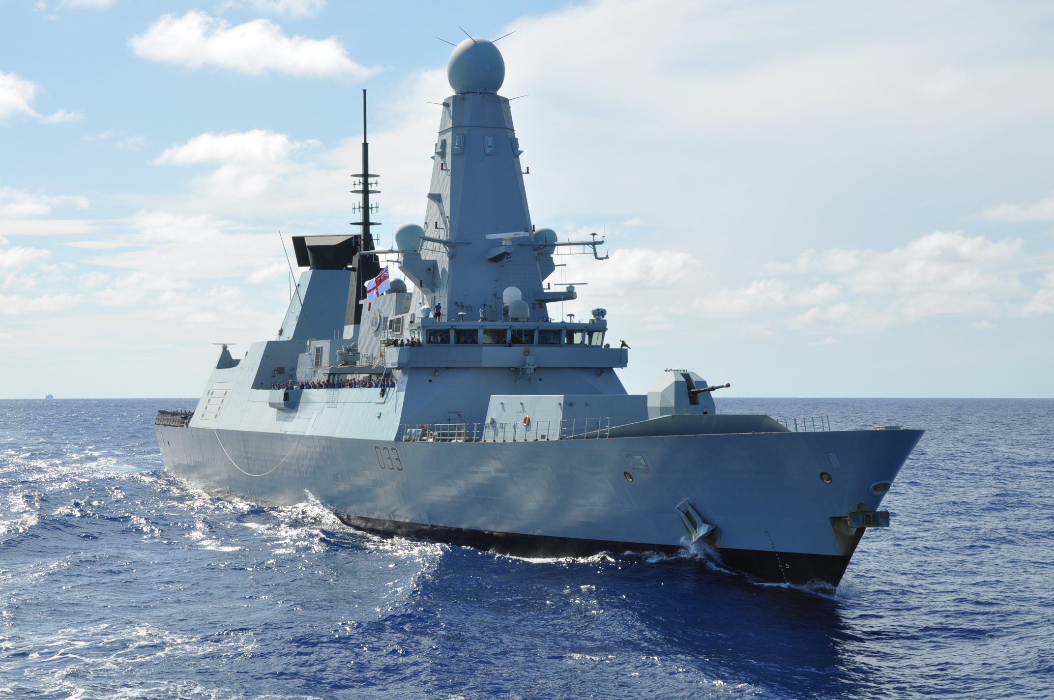 Эсминец ВМС Великобритании D-33 Dauntless во время учений UNITAS в Карибском море, 2012-09-28